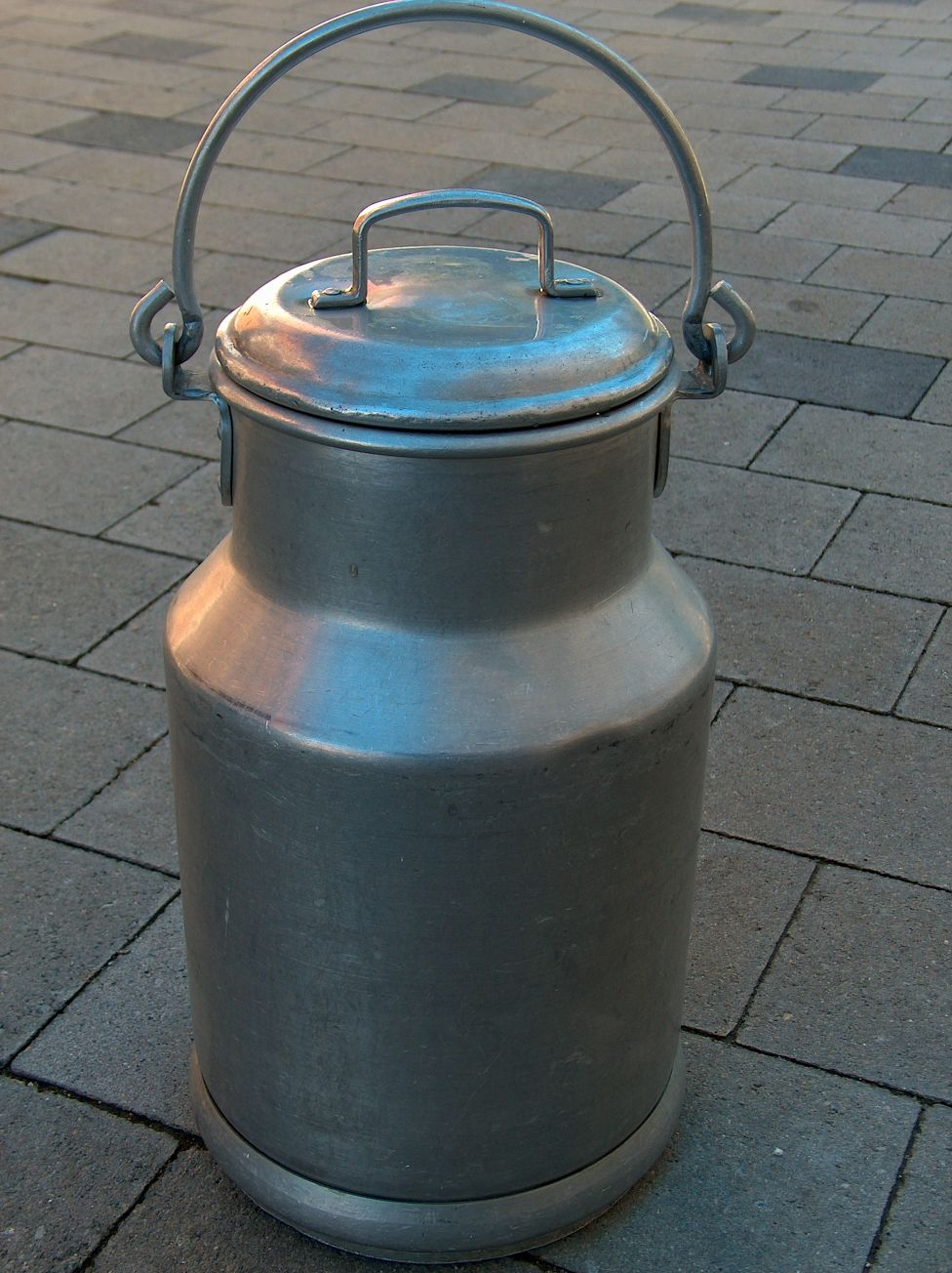 Milchkanne